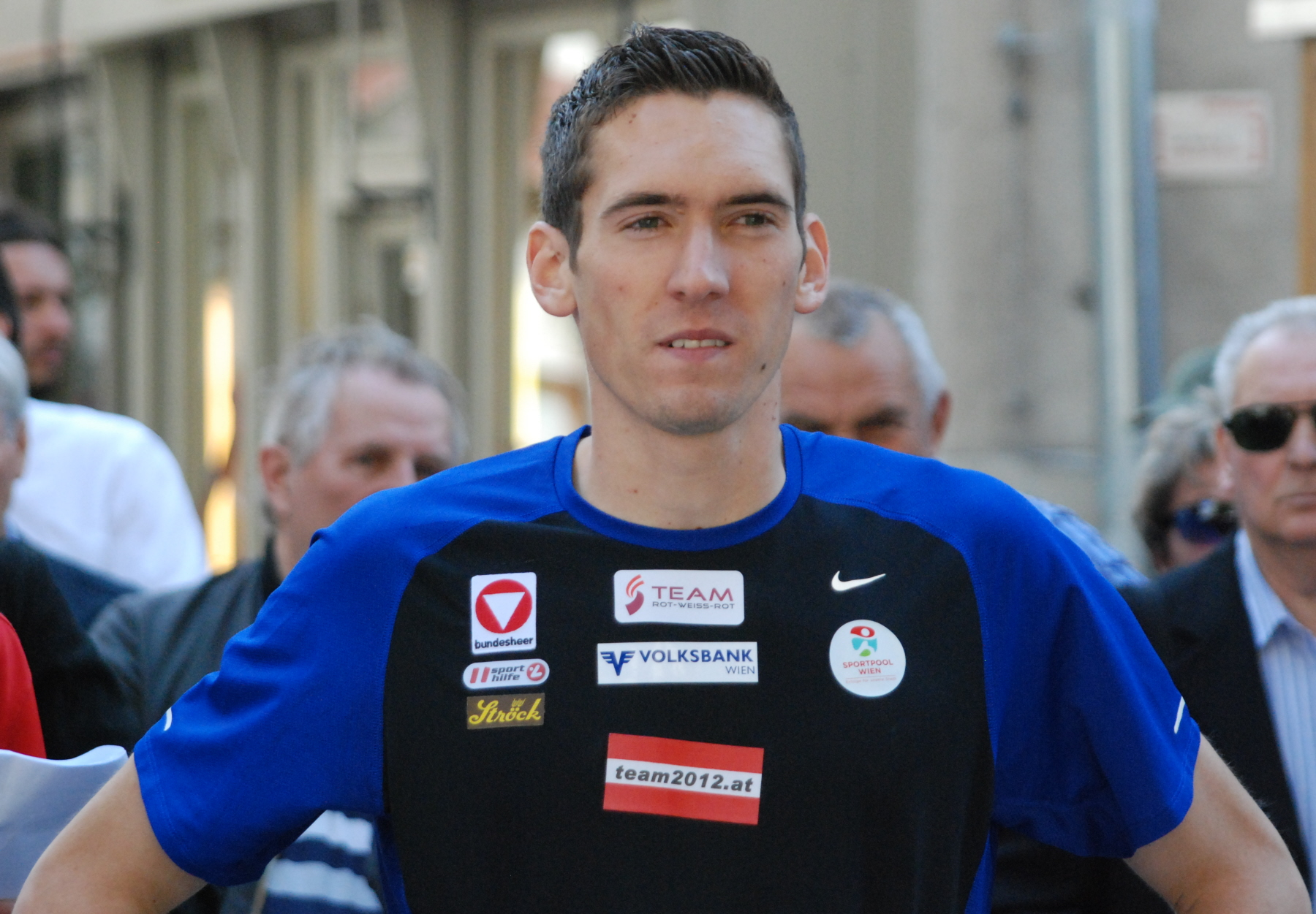 Andreas Vojta beim 1. Steffl-Turmlauf in Wien.